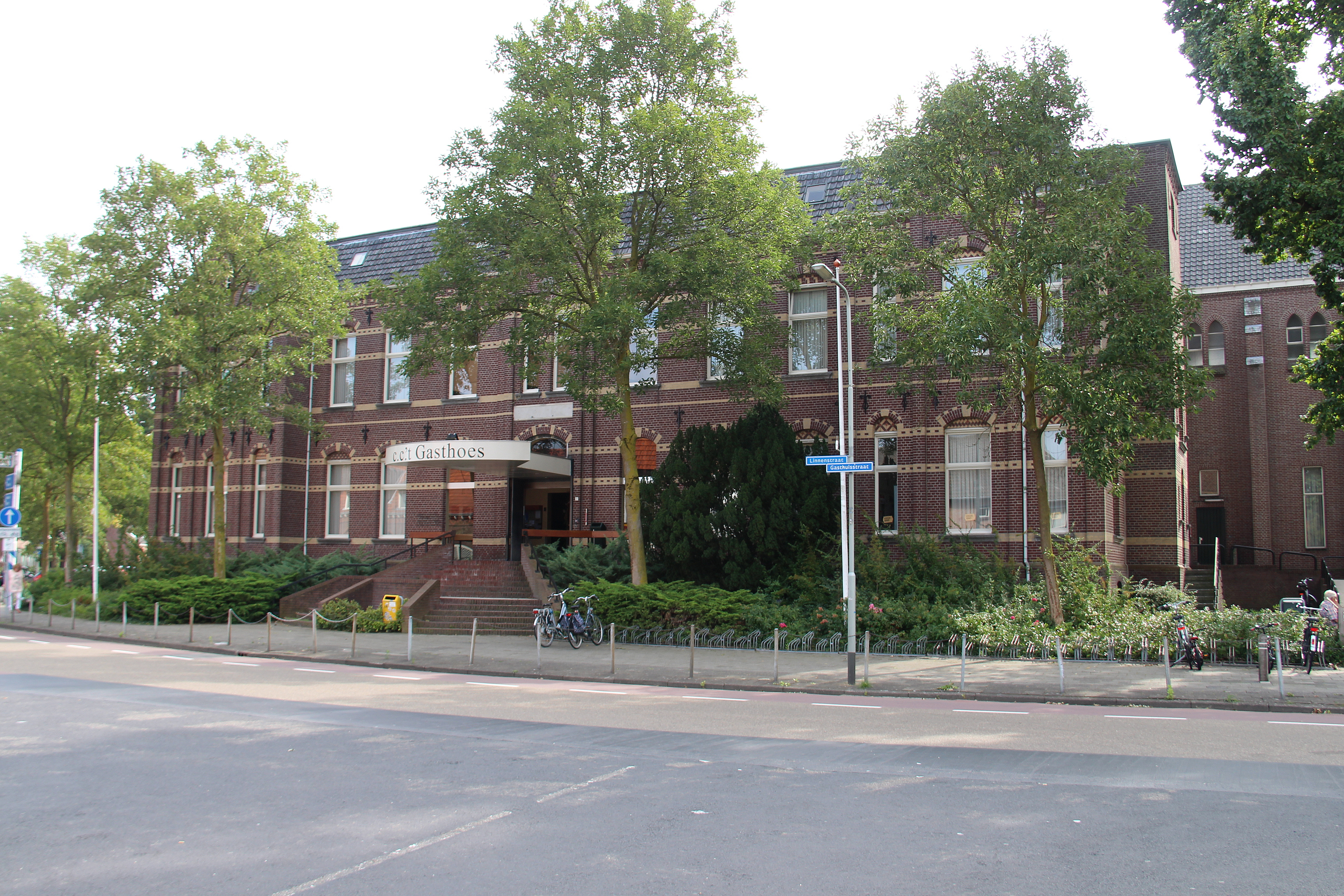 Het complex is gebouwd in 1901 naar plannen van J. Jorna. De uit 1937 daterende kapel is ontworpen door J. Franssen. Het gebouw deed lange tijd dienst als ziekenhuis. Nu is het gebouw in gebruik als multicultureel centrum 't Gasthoes.